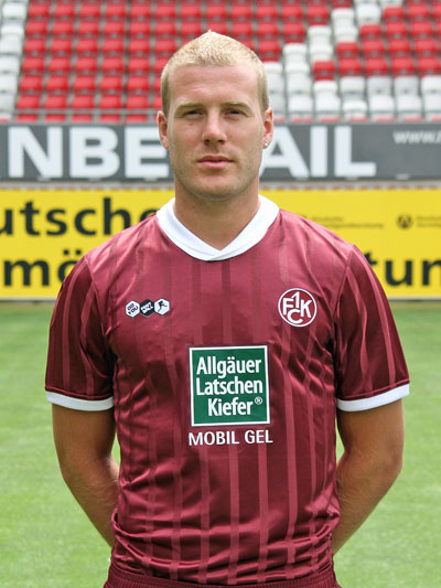 Adam Nemec, Fußballspieler